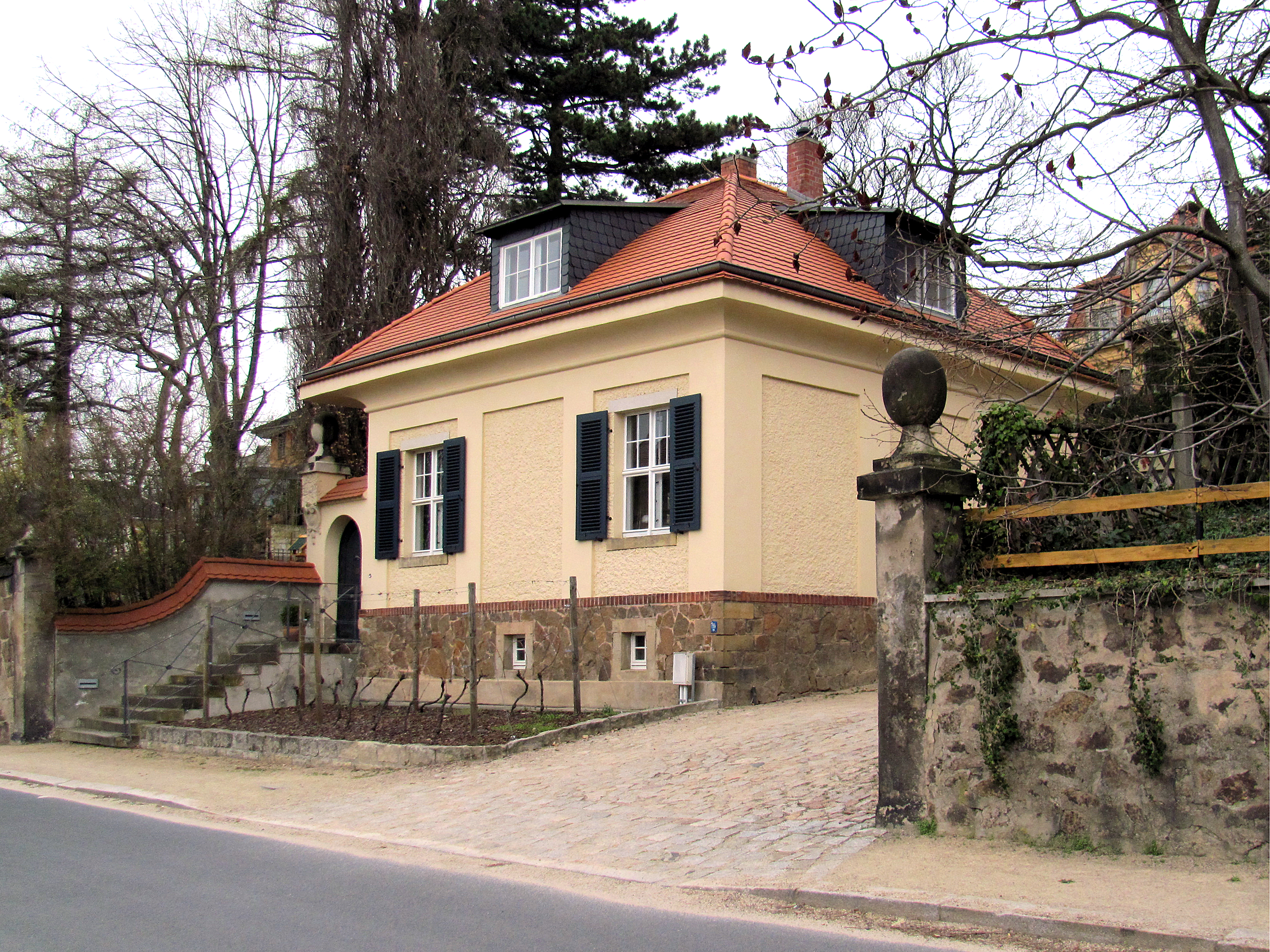 Radebeul, Villa Albert Kuntze, Pförtnerhaus